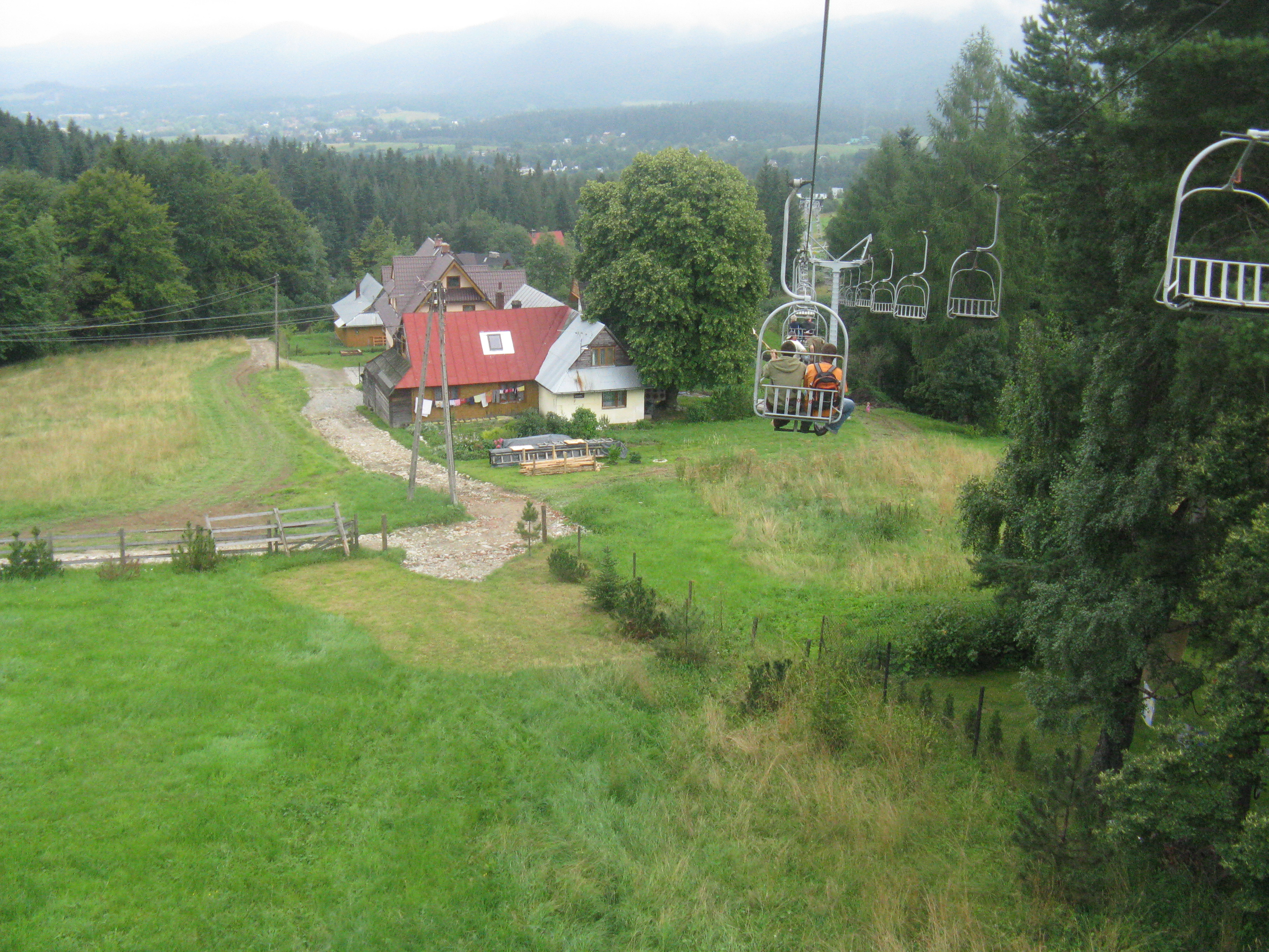 Kolej krzesełkowa Butorowy Wierch